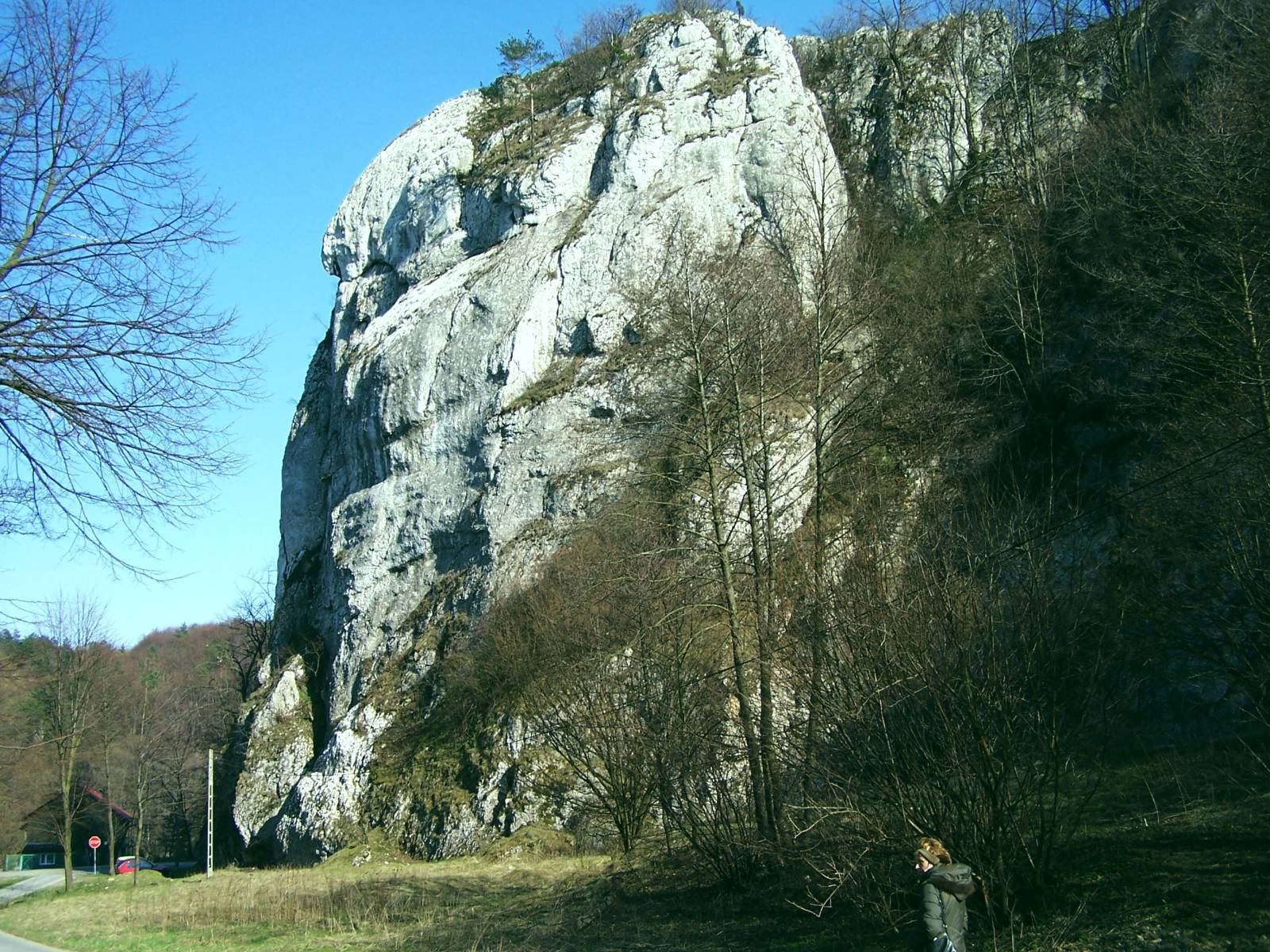 Rezerwat przyrody Zimny Dół